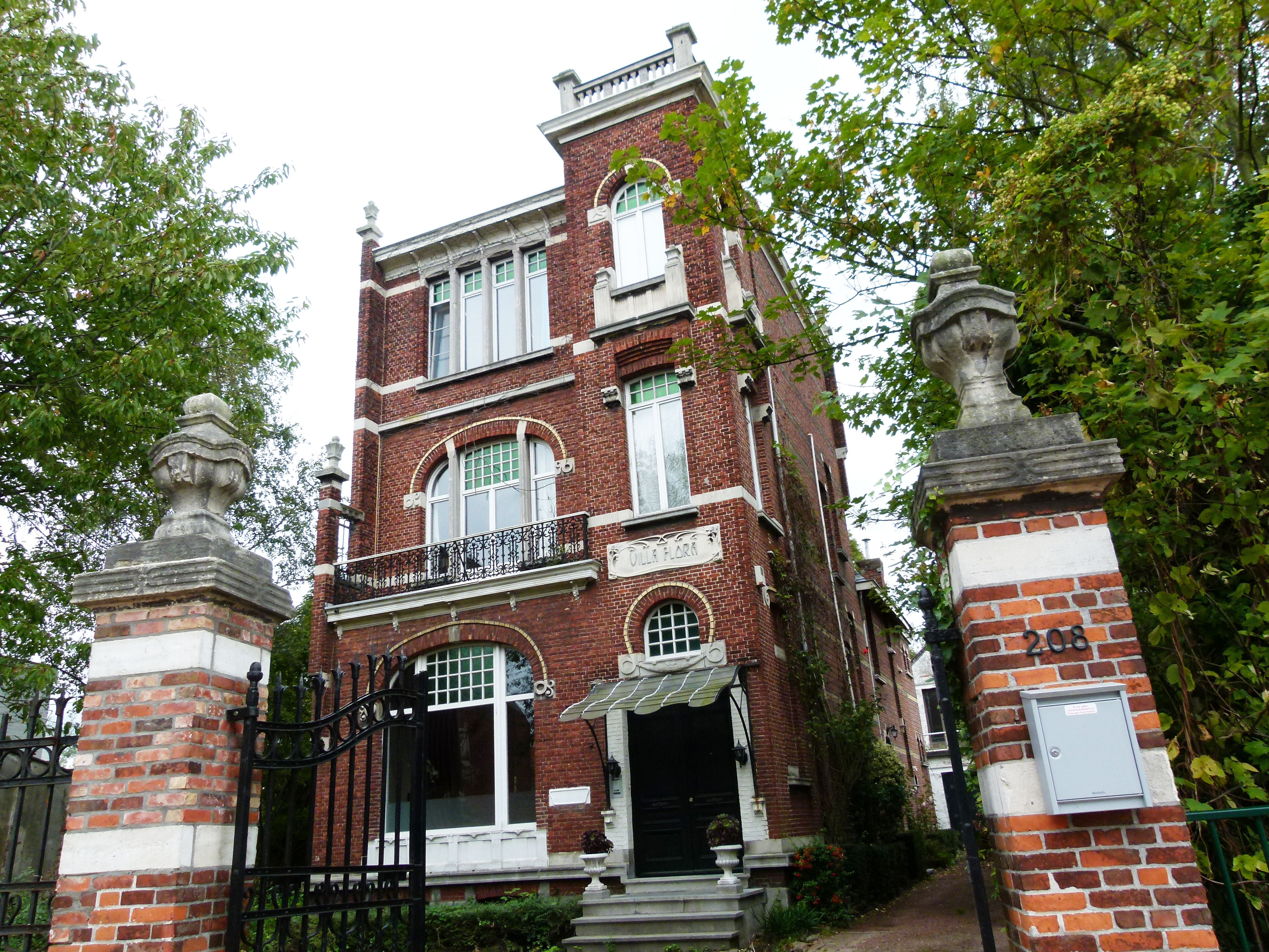 Zogenaamd Villa Flora, villa in eclectische stijl, uit het eerste kwart van de 20ste eeuw, met art-nouveau-inslag; open bebouwing met tuinhek aan straatzijde. Deuzeldlaan 208, Schoten